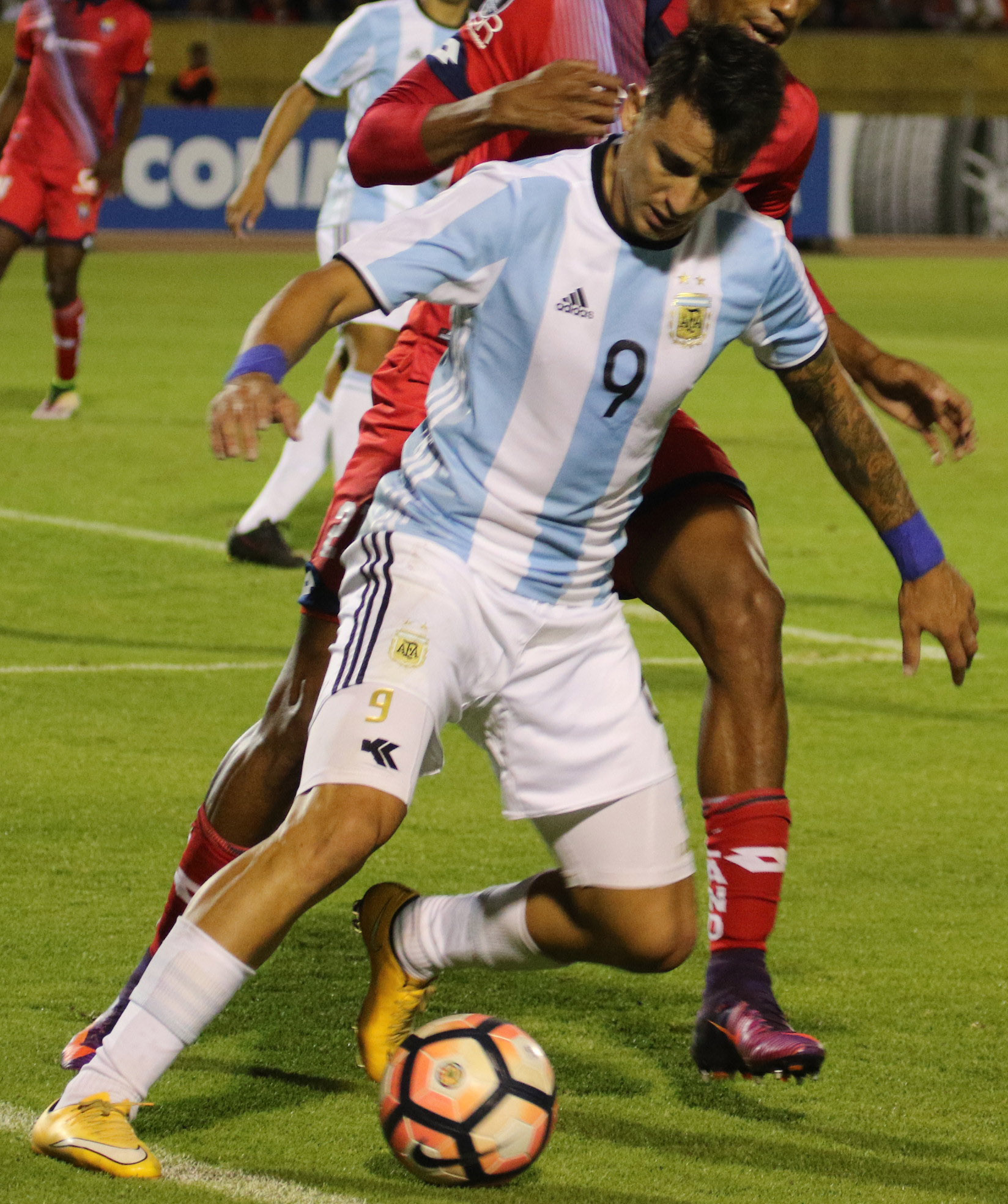 Quito, 7 Feb (Andes).- Encuentro por copa libertadores entre Nacional de Ecuador vs Atlético Tucumán de Argentina. Fotografías: Carlos Rodríguez/Andes.